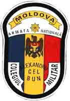 Colegiul Militar